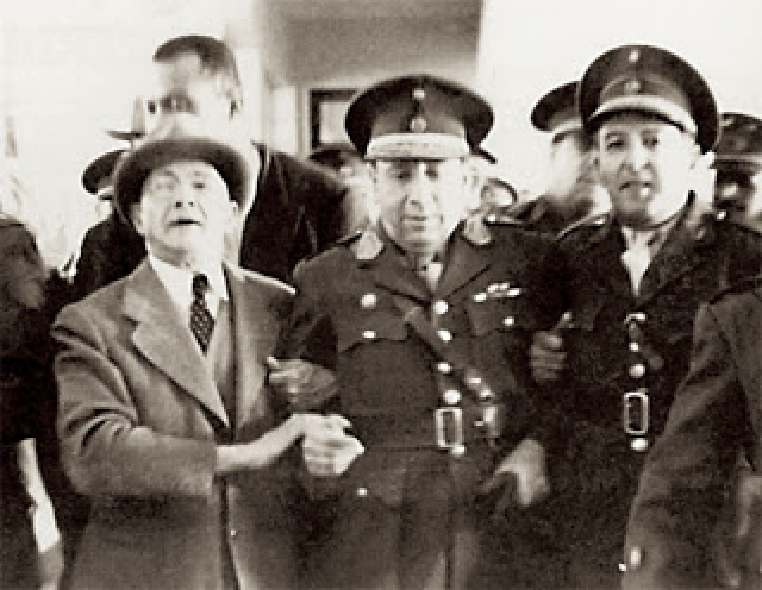 Golpe de Estado en Perú de 1948